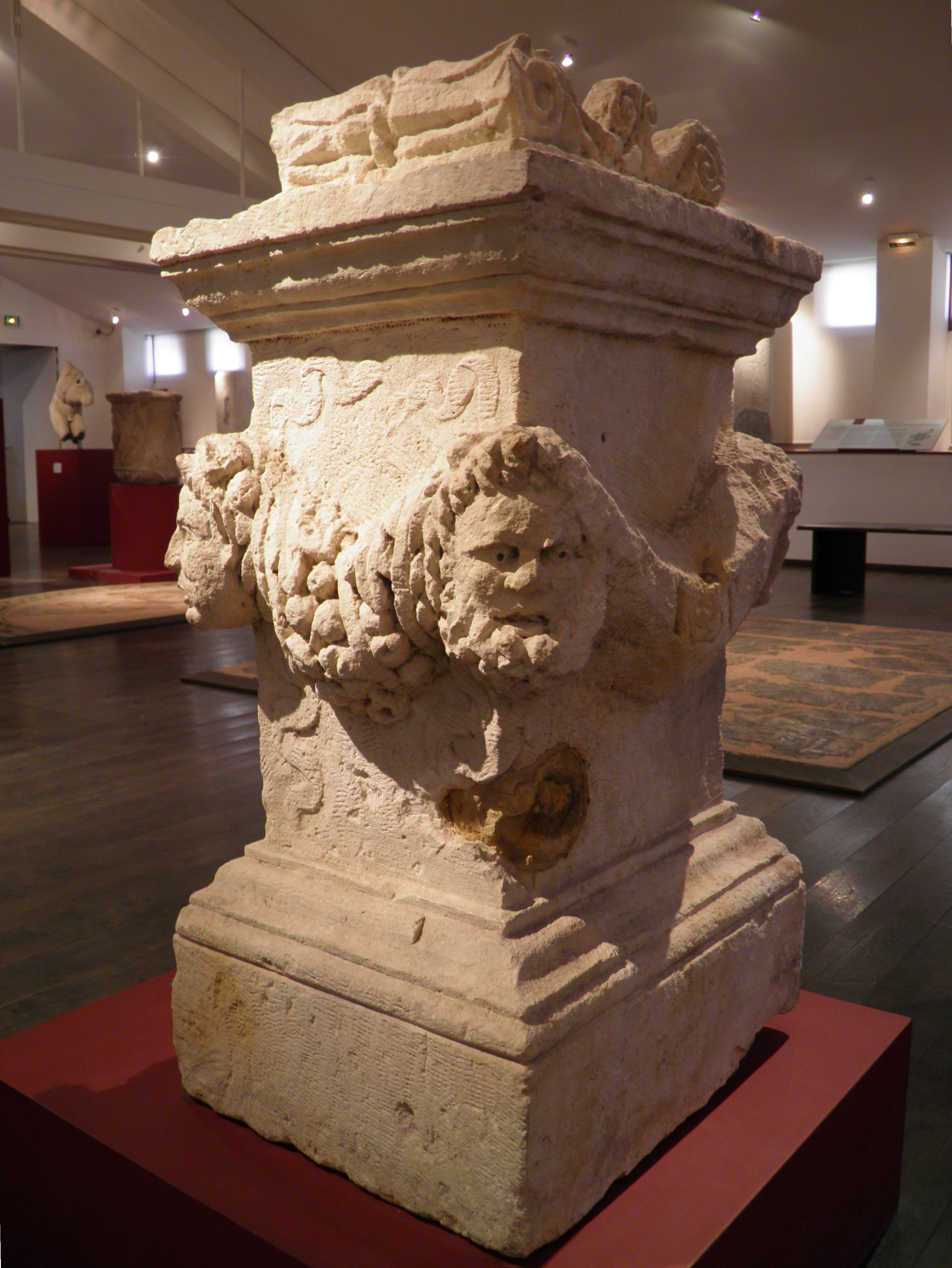 Ce monument est un autel. Il était utilisé lors des sacrifices offerts à une divinité : les offrandes y étaient déposées puis brûlées. Une guirlande de fruits et d’épis de blé maintenue par deux rubans orne chaque face de l’autel ; elle est reliée, aux angles, à des visages. D’un côté de l’autel sont représentées deux têtes, celle d’un silène barbu et celle d’un satyre imberbe. Il s’agit de créatures à moitié animales, comme le prouvent leurs longues oreilles pointues. Ces êtres appartiennent au cortège qui accompagne le dieu grec Dionysos, dieu de la vigne et de l’ivresse, le Bacchus de la religion romaine. De l’autre côté de l’autel, on peut voir un homme âgé barbu coiffé d’une perruque de théâtre et un jeune homme imberbe, les cheveux attachés avec un bandeau. Leurs pupilles percées les rendent plus vivants. Ces masques rappellent que Dionysos est à l’origine du théâtre grec. Ce style de sculpture se retrouve dans les masques ornant le grand mausolée de Glanum, à Saint-Rémy-de-Provence. Mis au jour dans le secteur actuel de la cathédrale, il laisse présumer qu’un culte à Bacchus existait en ce lieu à l’époque romaine. Le travail du sculpteur évoque le début de l’Empire. Bacchus y revêt alors des fonctions agraires plus importantes que Dionysos, divinité plus complexe et subversive.